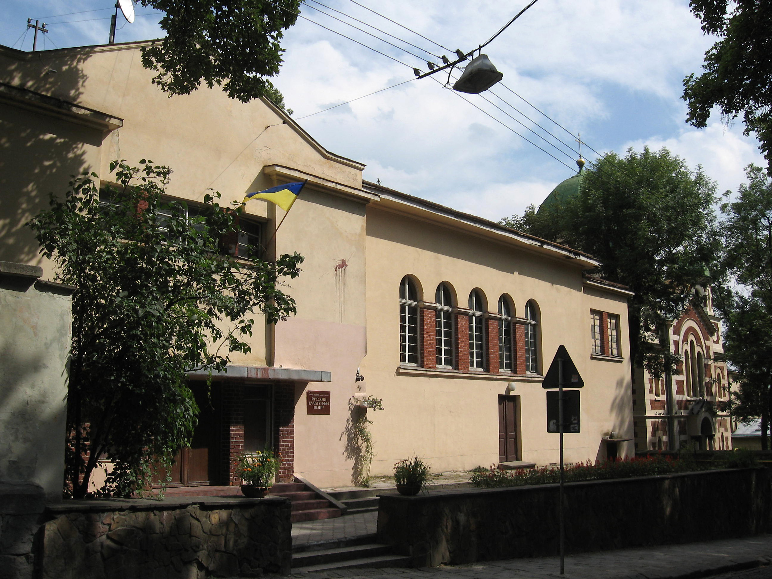 Russian cultural center in Lviv, Ukraine